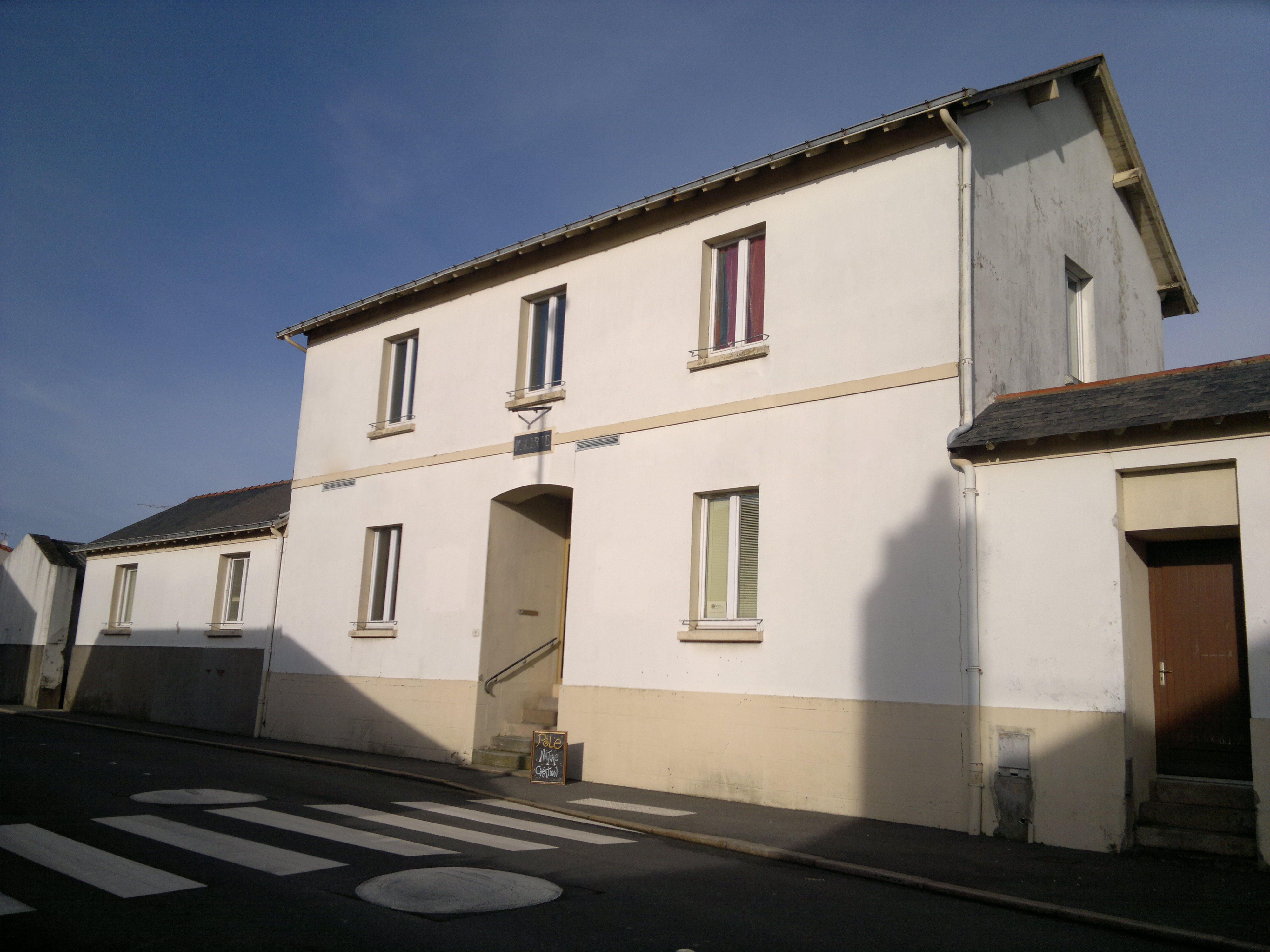 Ancienne mairie, Fr-44-Le Landreau.